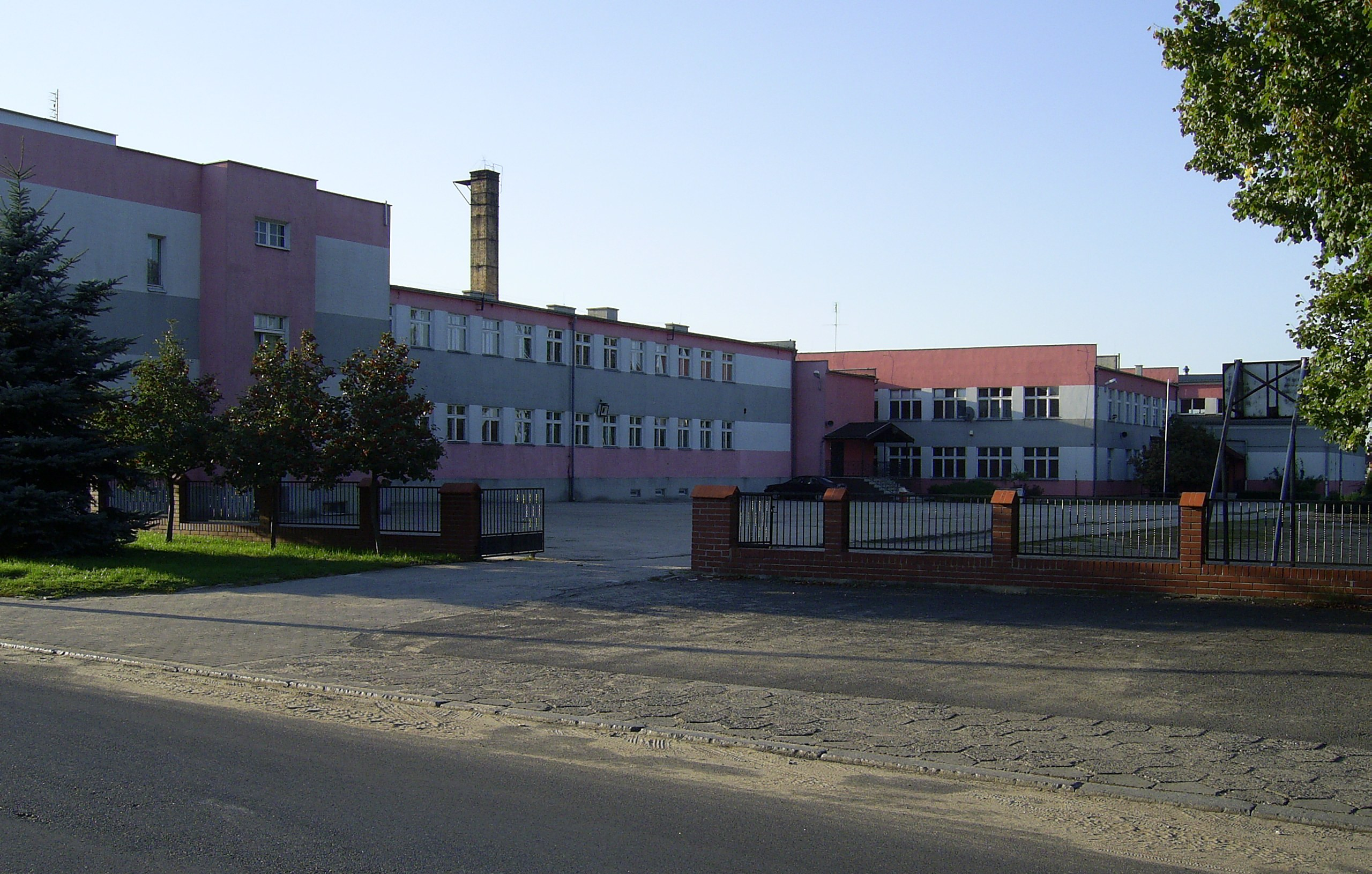 Zespól Szkól - Szkoła Podstawowa i Gymnazjum im Marii Skłodowskiej-Curie w Swieciechowie ul. Szkolna 15.